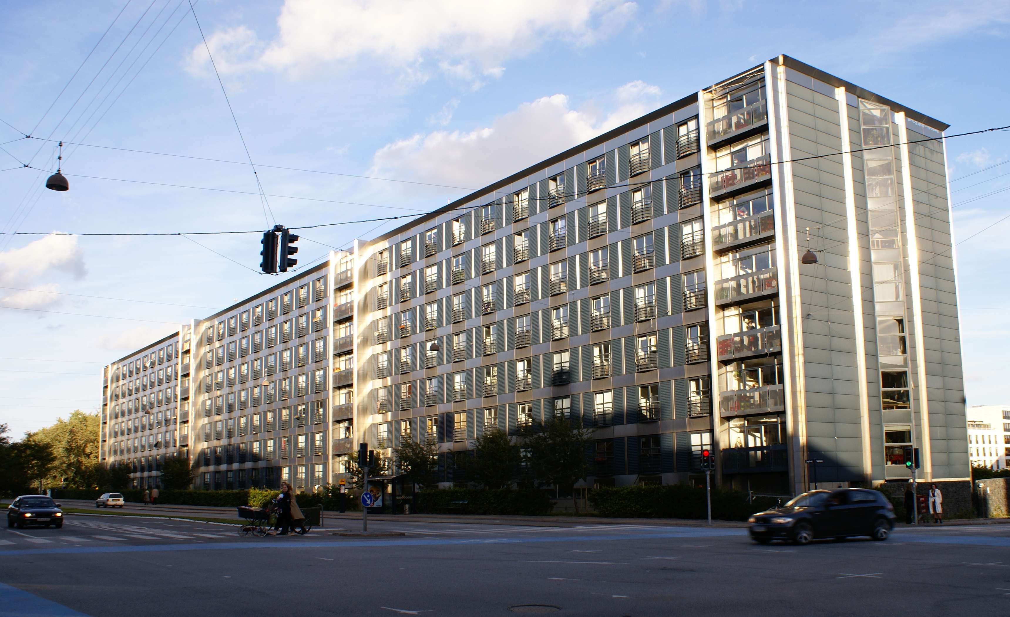 Rigshospitalets Kollegium in Copenhagen